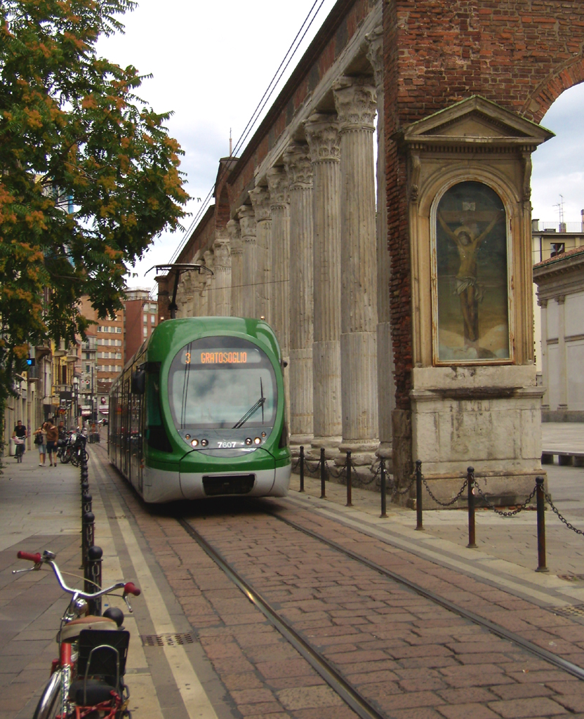 Vettura 7607 ("Sirietto" della serie 7600) dell’ATM di Milano in servizio sulla linea 3 diretta al Gratosoglio, in corso di Porta Ticinese presso le Colonne di San Lorenzo.